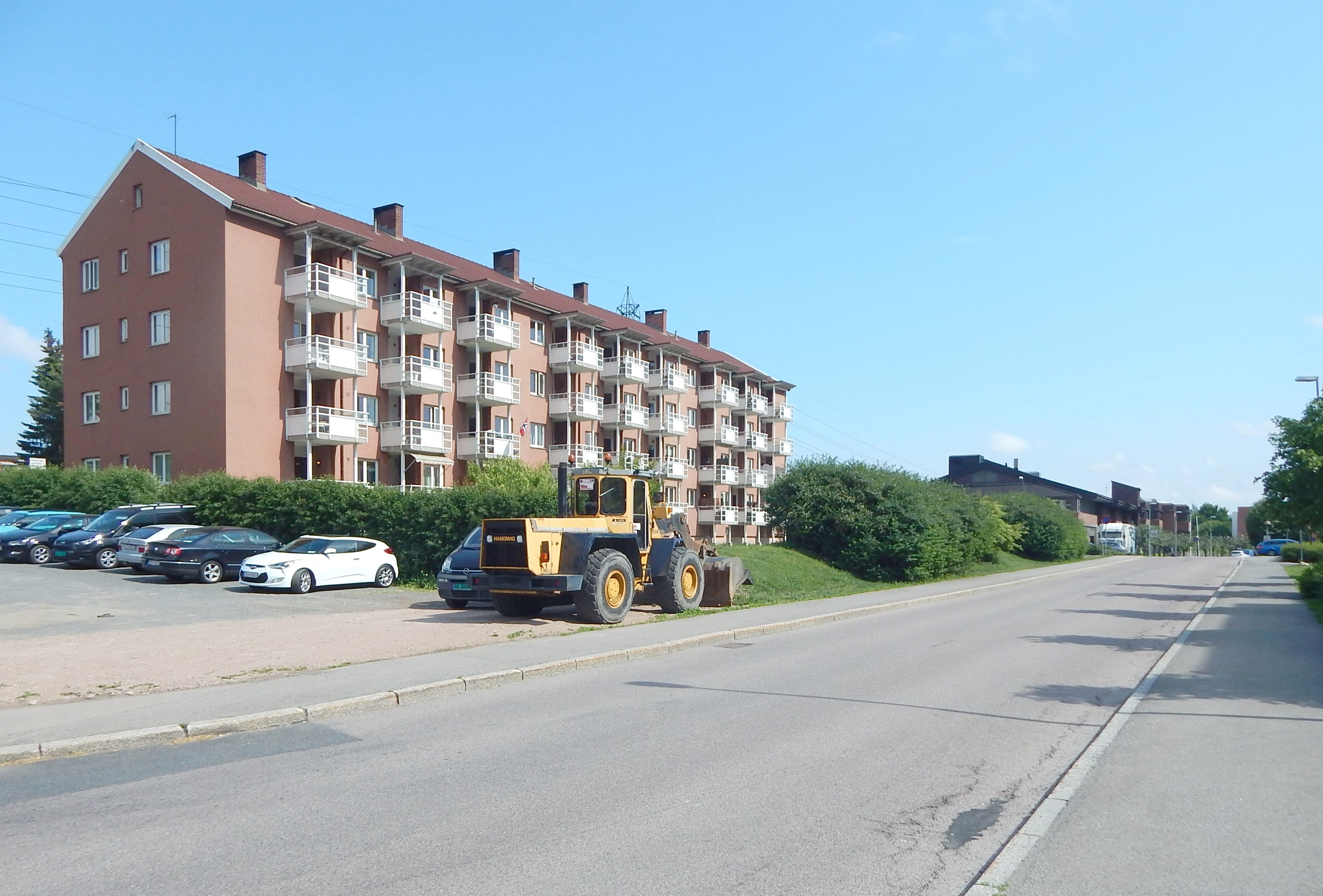 Svartdalsveien nær Ryenkrysset